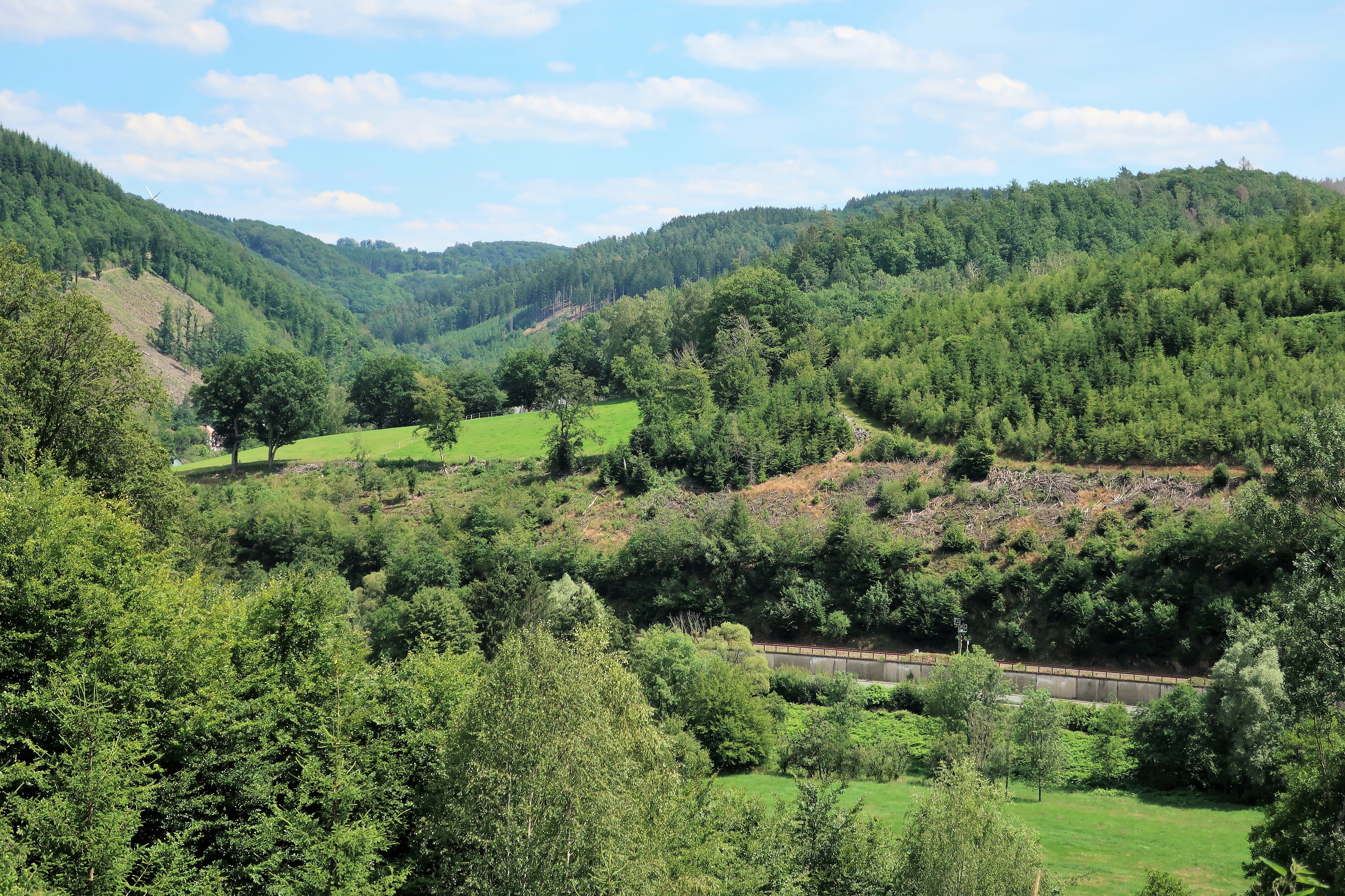 Landschaftsschutzgebiet „Muhlerohl“ in Hagen-Rummenohl. Der abgebildete Bereich befindet sich auf 280 m Höhe, oberhalb Rölveder Straße und Evringhauser Straße. Das gesamte Schutzgebiet liegt südlich von „Sterbecker Hammer“. Es handelt sich überwiegend um bewaldete Flächen. Foto: Schutzgebiet oberhalb der Rummenohler Straße (B 54).